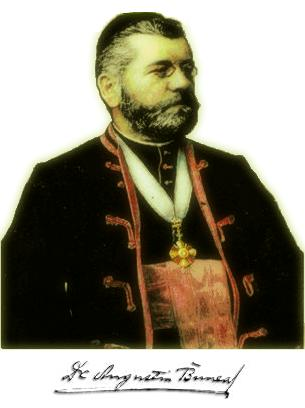 Augustin Bunea (n. 4 august 1857, Vad, comitatul Făgăraș - d. 30 noiembrie 1909, Blaj, comitatul Alba de Jos) a fost un istoric și teolog greco-catolic român, membru titular al Academiei Române.